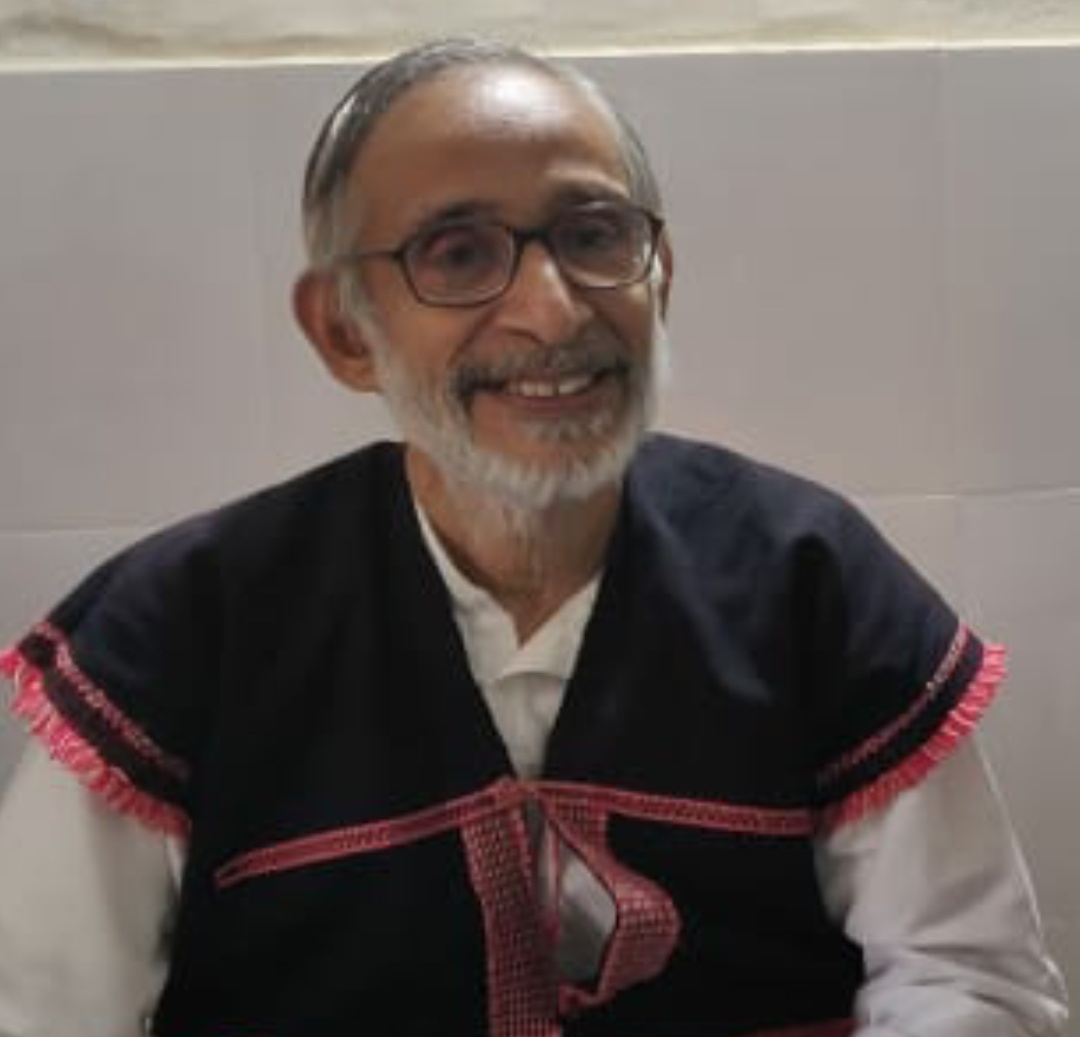 സത്യനാരായണ മുണ്ടയൂർ